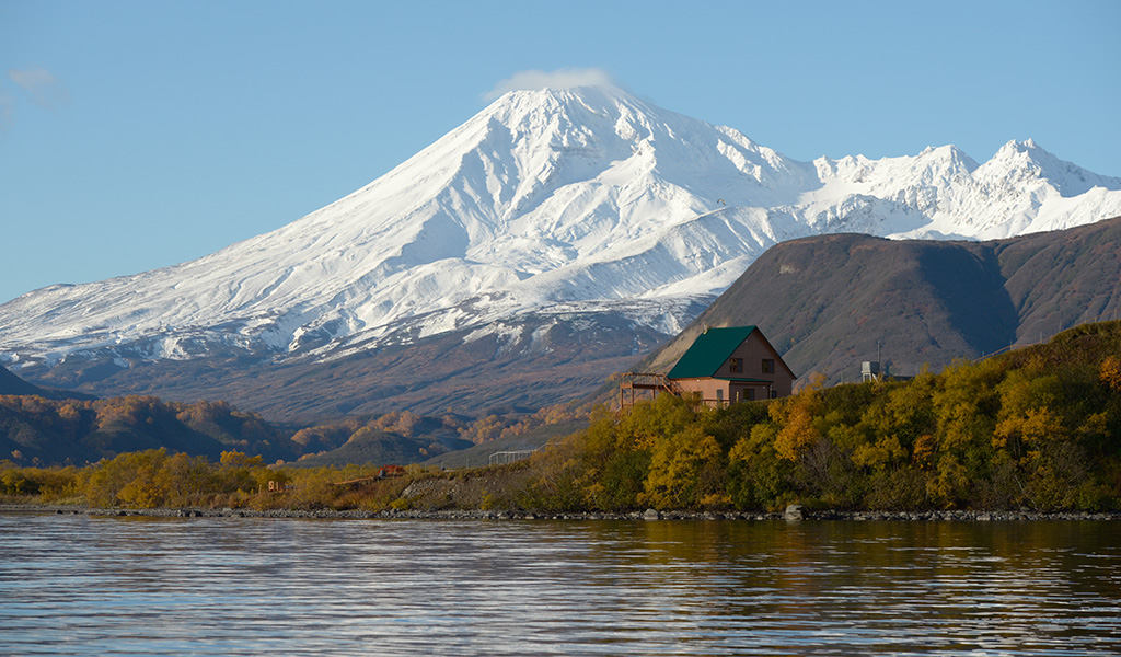 Вулкан Камбальный